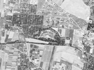 Fort V Twierdzy Poznań sfotografowany przez satelitę KH-4A 1023, 23 sierpnia 1965 r.